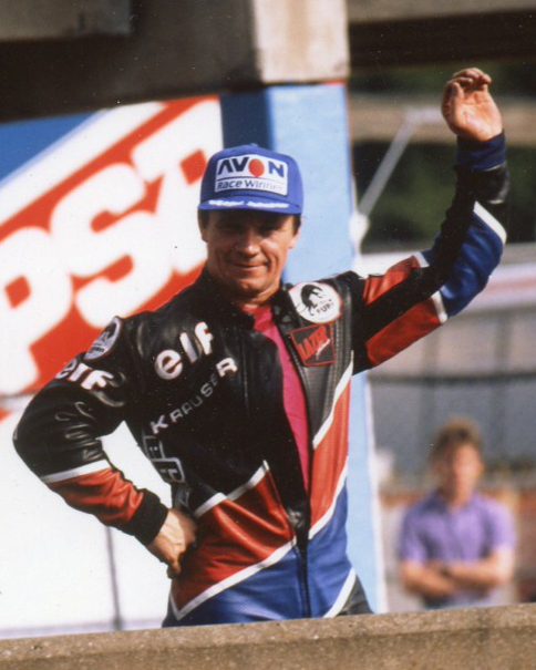 Alain Michel savoure son titre.